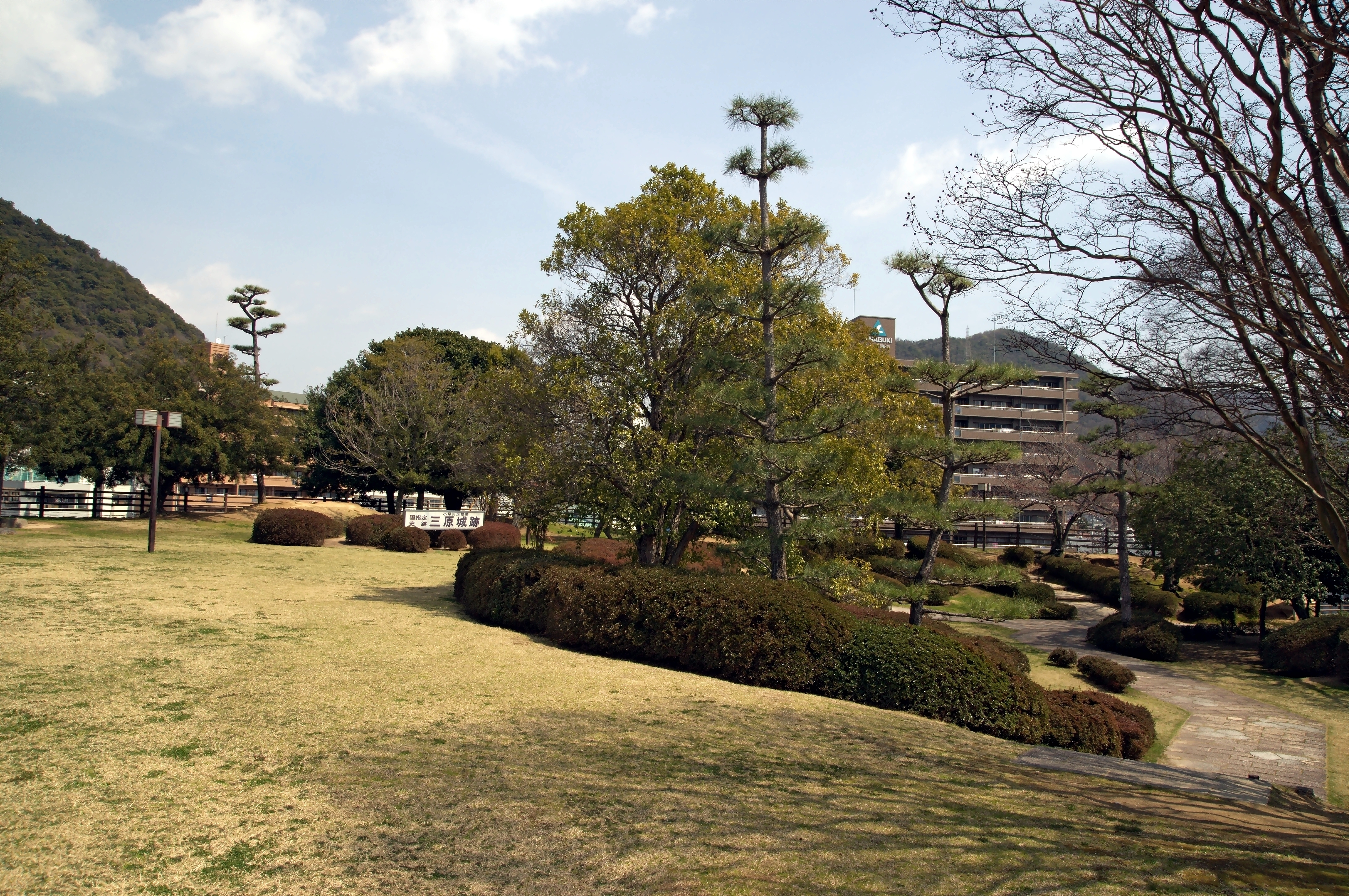 三原城天主台跡